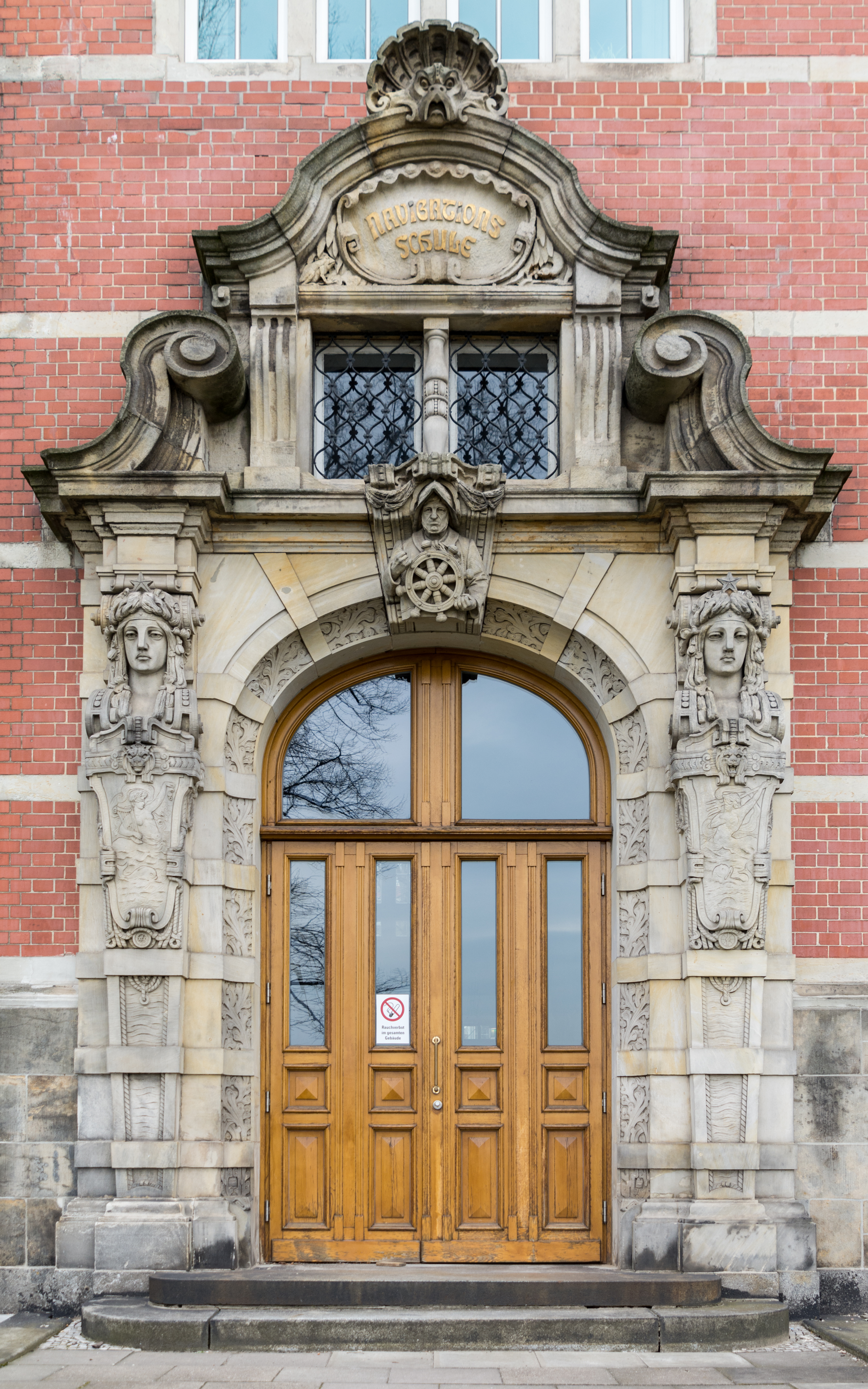 Portal der ehemaligen Navigationsschule (heutiges Seewetteramt) in Hamburg-St. Pauli. This is a photograph of an architectural monument.